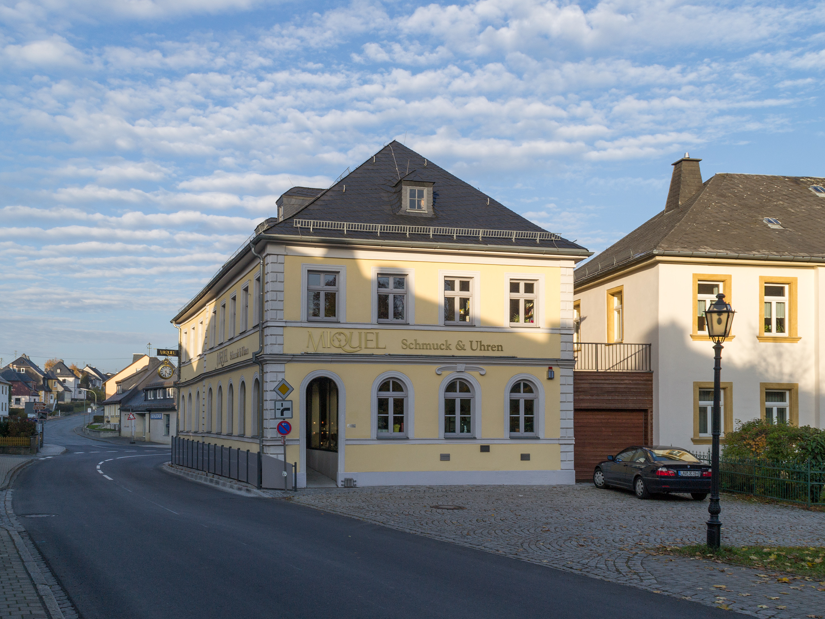 Gebäude Hauptstraße 42 in Teuschnitz